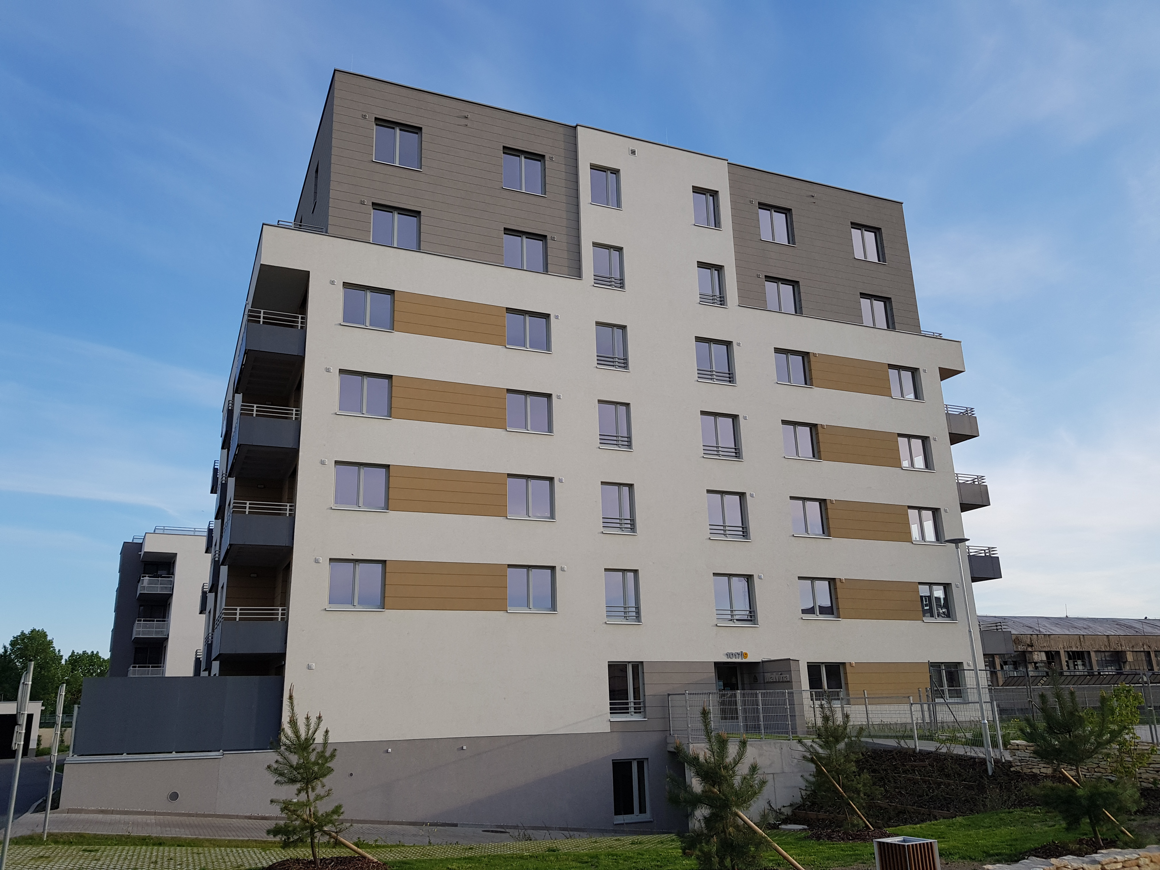 Dům Malvína, ul. Svatošových čp. 1017/9, součást developerského projektu Čtvrť Emila Kolbena, Praha 9-Vysočany